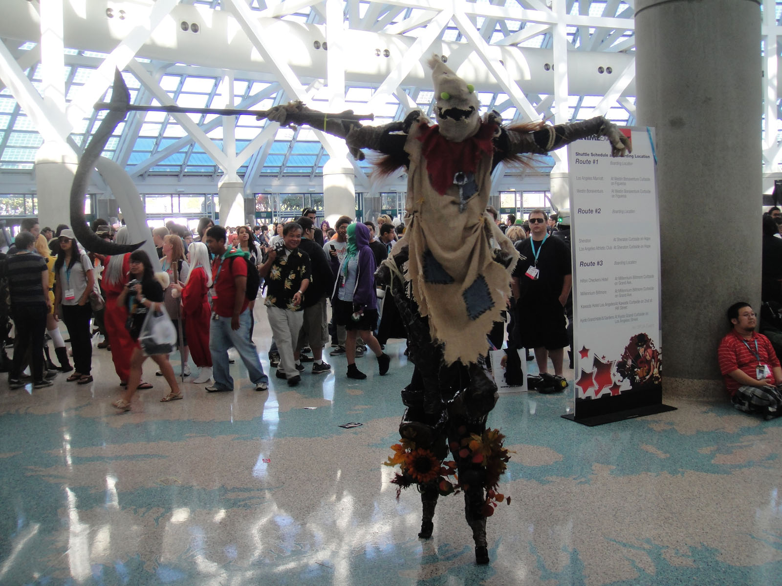 Anime Expo 2012